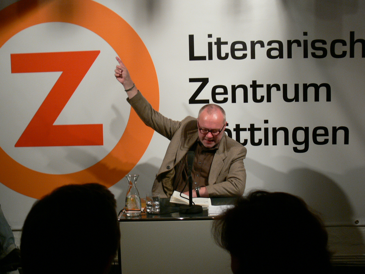 Die Metropole ist im Kopf oder nirgends – Slogan des Zentrums. Hier der Universalgelehrte Thomas Kapielski am Abend des 14.09.2006